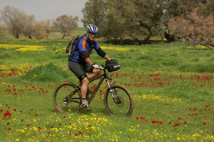 דרום אדום בסינגל של בארי